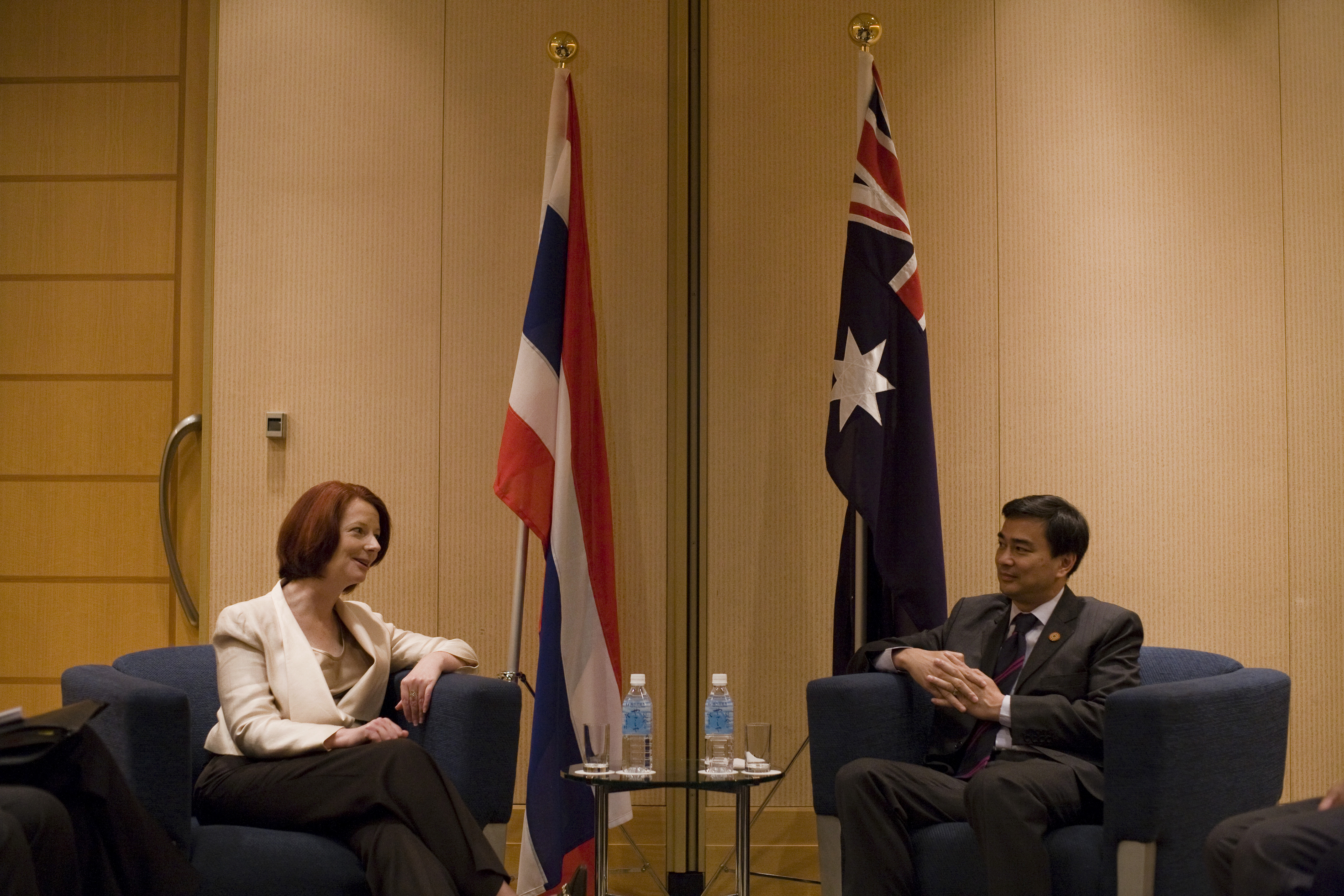 การหารือข้อราชการระหว่างนายกรัฐมนตรีกับนายกรัฐมนตรีเครือรัฐออสเตรเลีย ณ โรงแรม Pan Pacific เมืองโยโกฮามา ประเทศญี่ปุ่น วันเอาทิตย์ ที่ 14 พฤศจิกายน พ.ศ.2553 (Photographer attached to the Prime Minister of the Kingdom of Thailand : Peerapat Wimolrungkarat / พีรพัฒน์ วิมลรังครัตน์) @is50mm